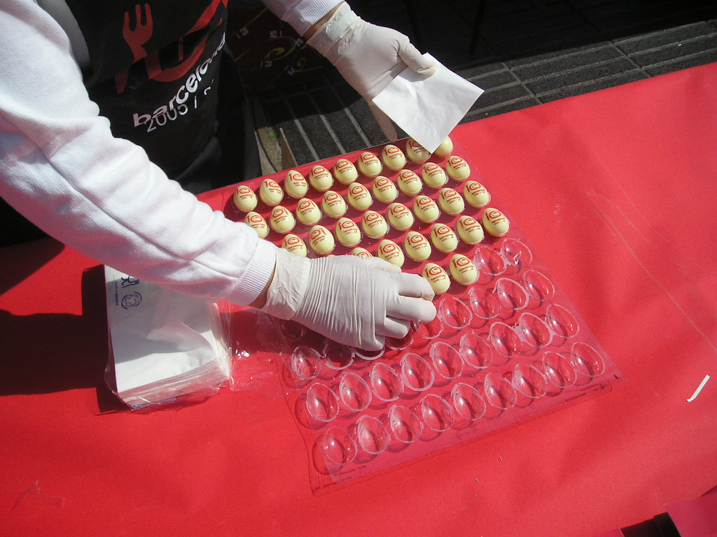 Ous de xocolata